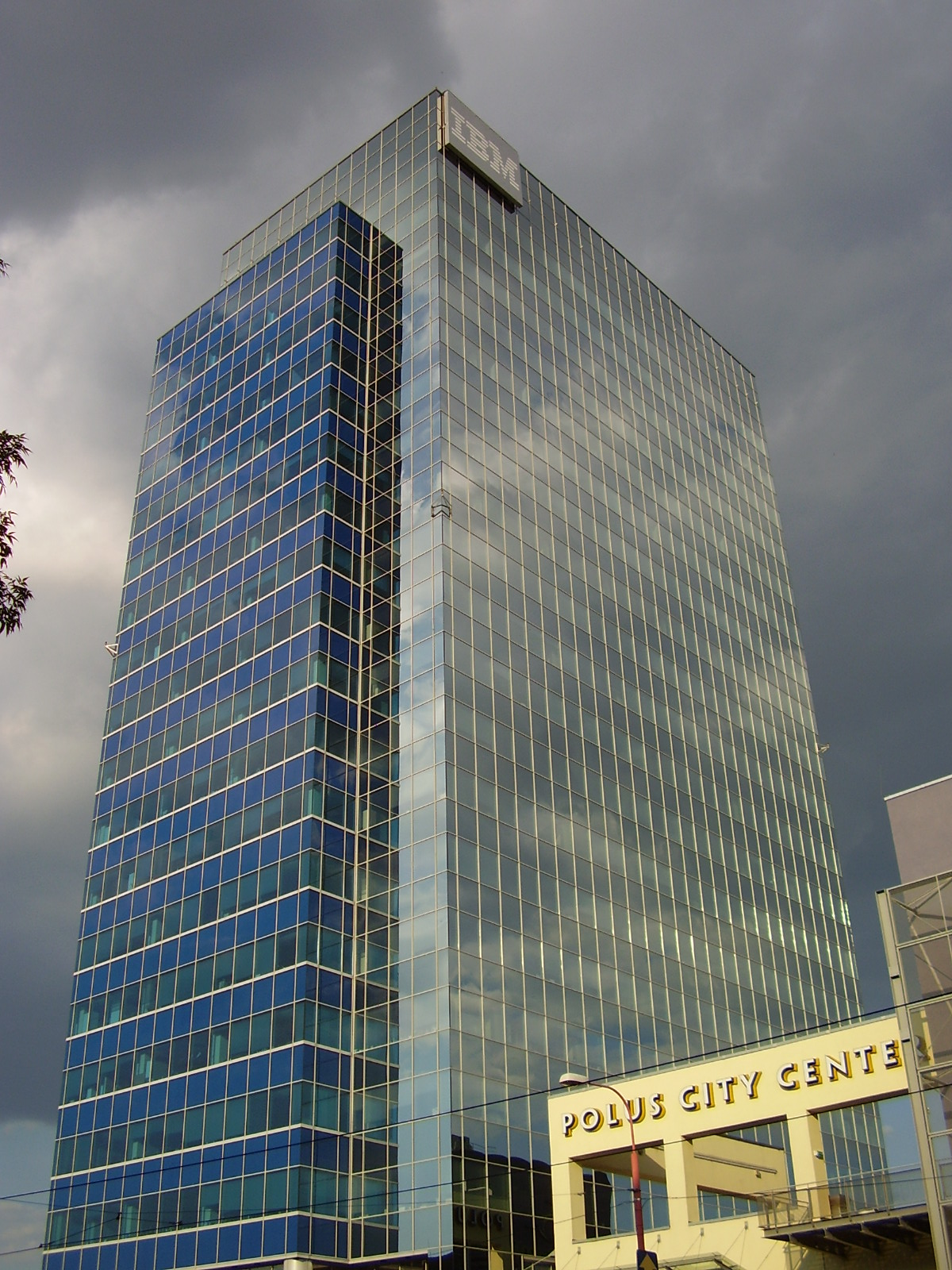 Millenium Tower II.